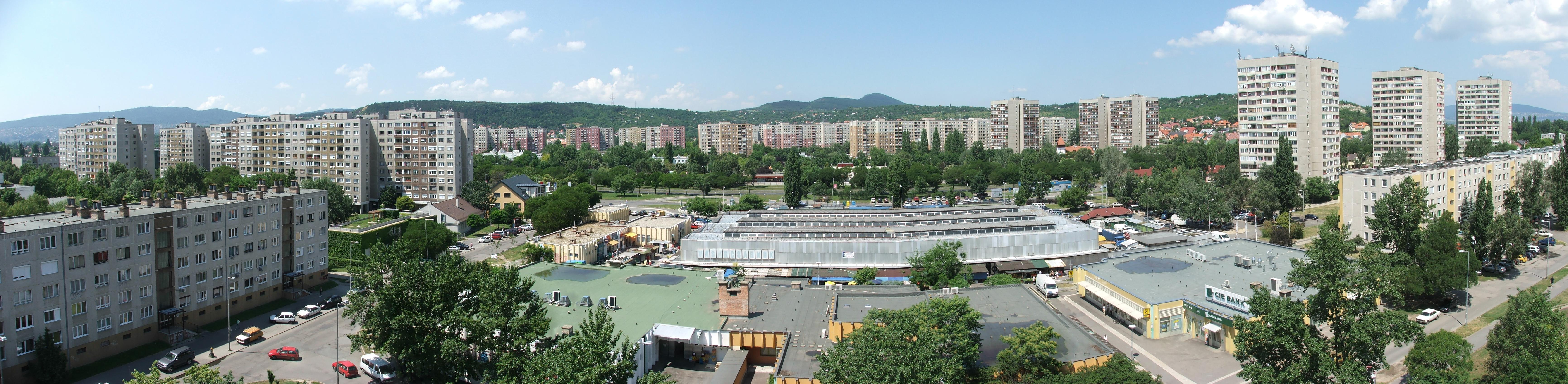 Békásmegyeri panorámakép